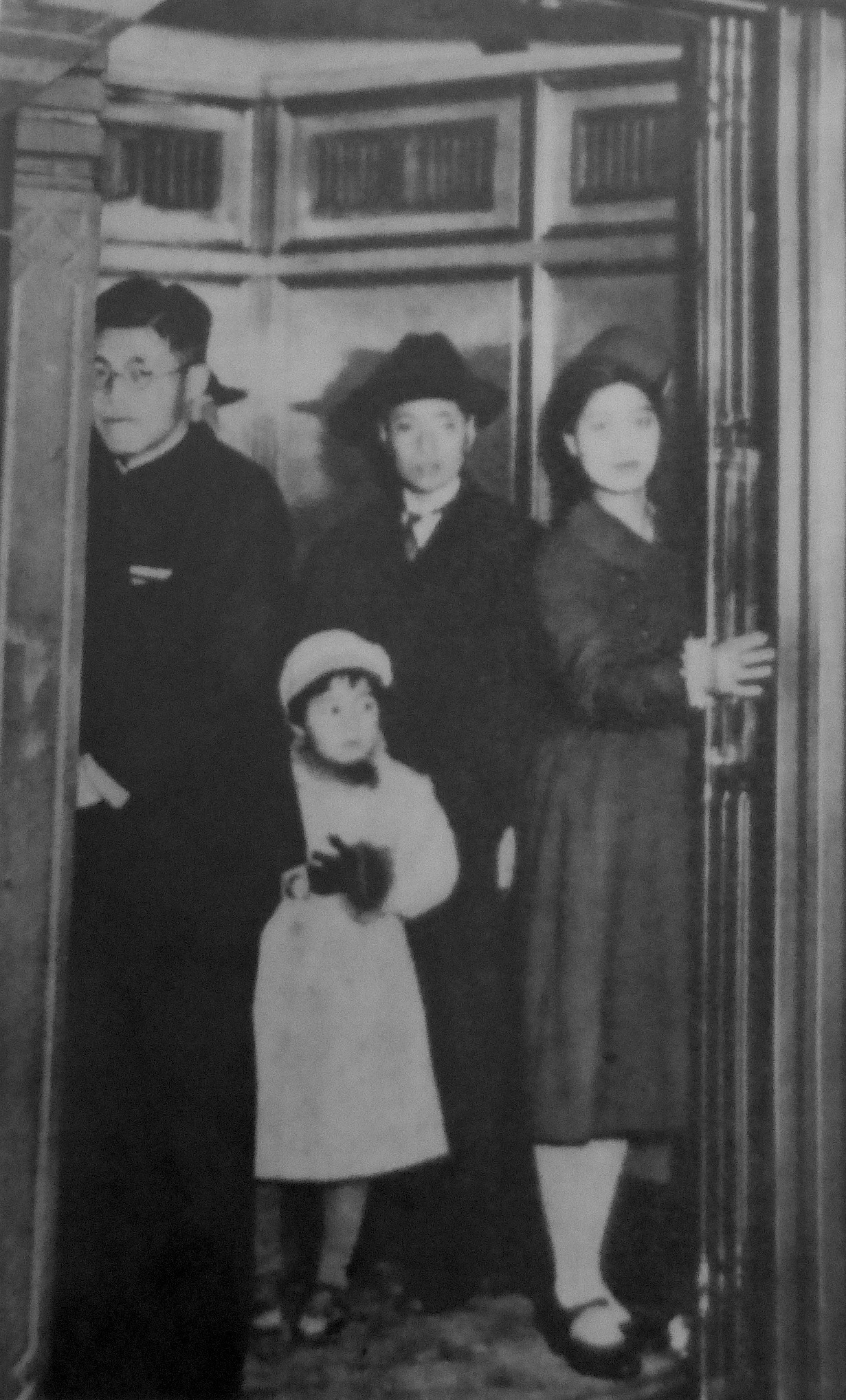 日本のエレベーターガール (female Japanese elevator operator)